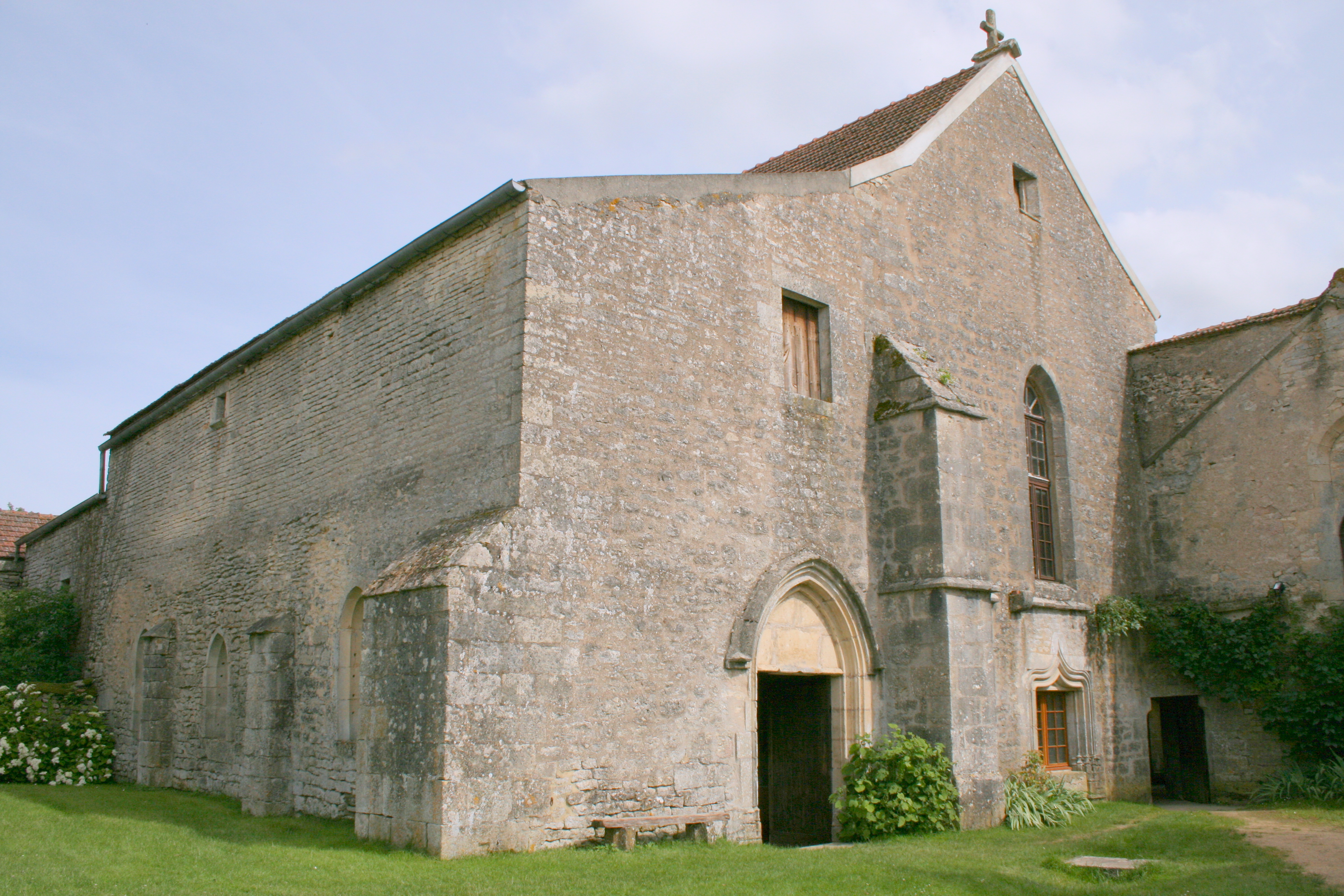 Châtel-Gérard Prieuré de Vausse Eglise